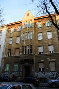 Gajeva ulica 49/1